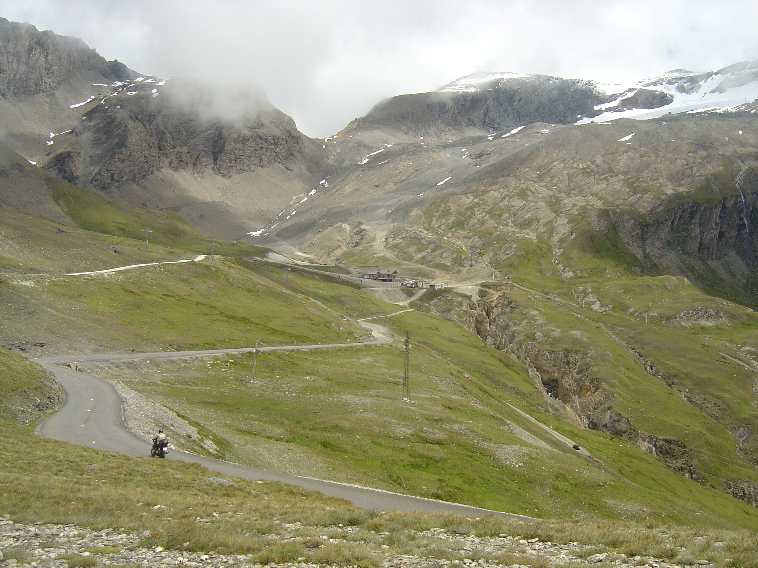 Dernier kilomètre du versant sud du col de l'Iseran. Vue sur le restaurant La Cascade plus bas et plus haut sur le col Pers (3009m), la pointe Pers (3327m) et l'aiguille de Pers (3386m)